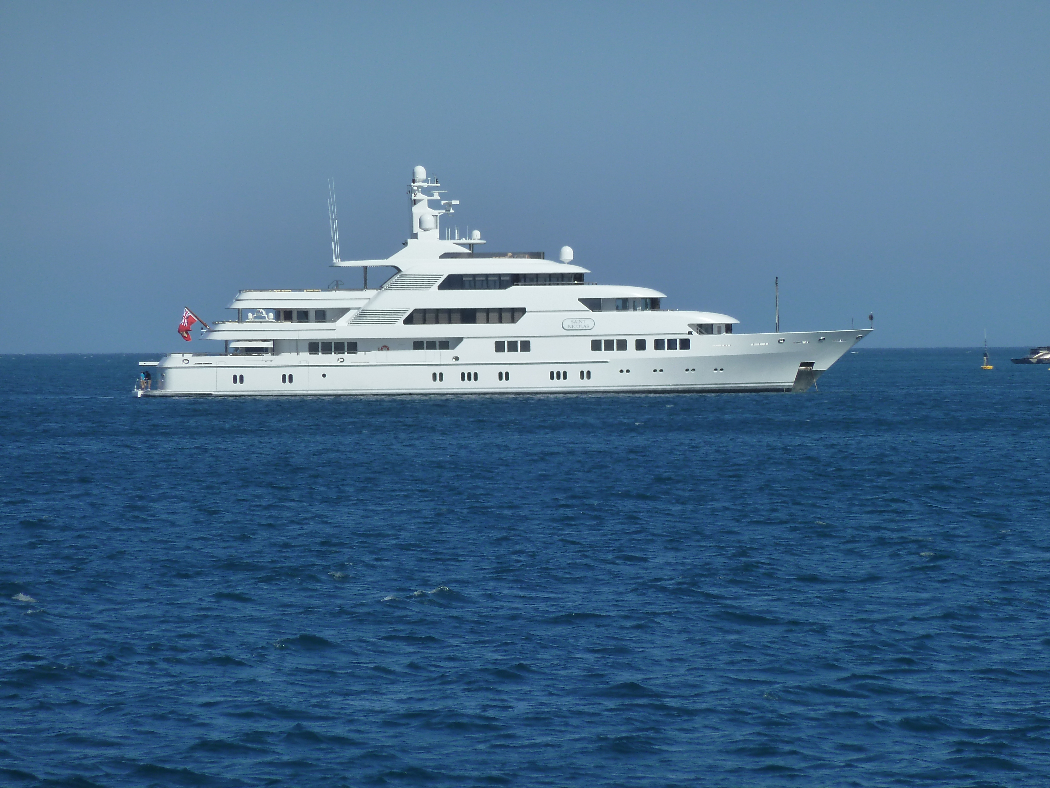 Saint Nicolas devant Juan L P